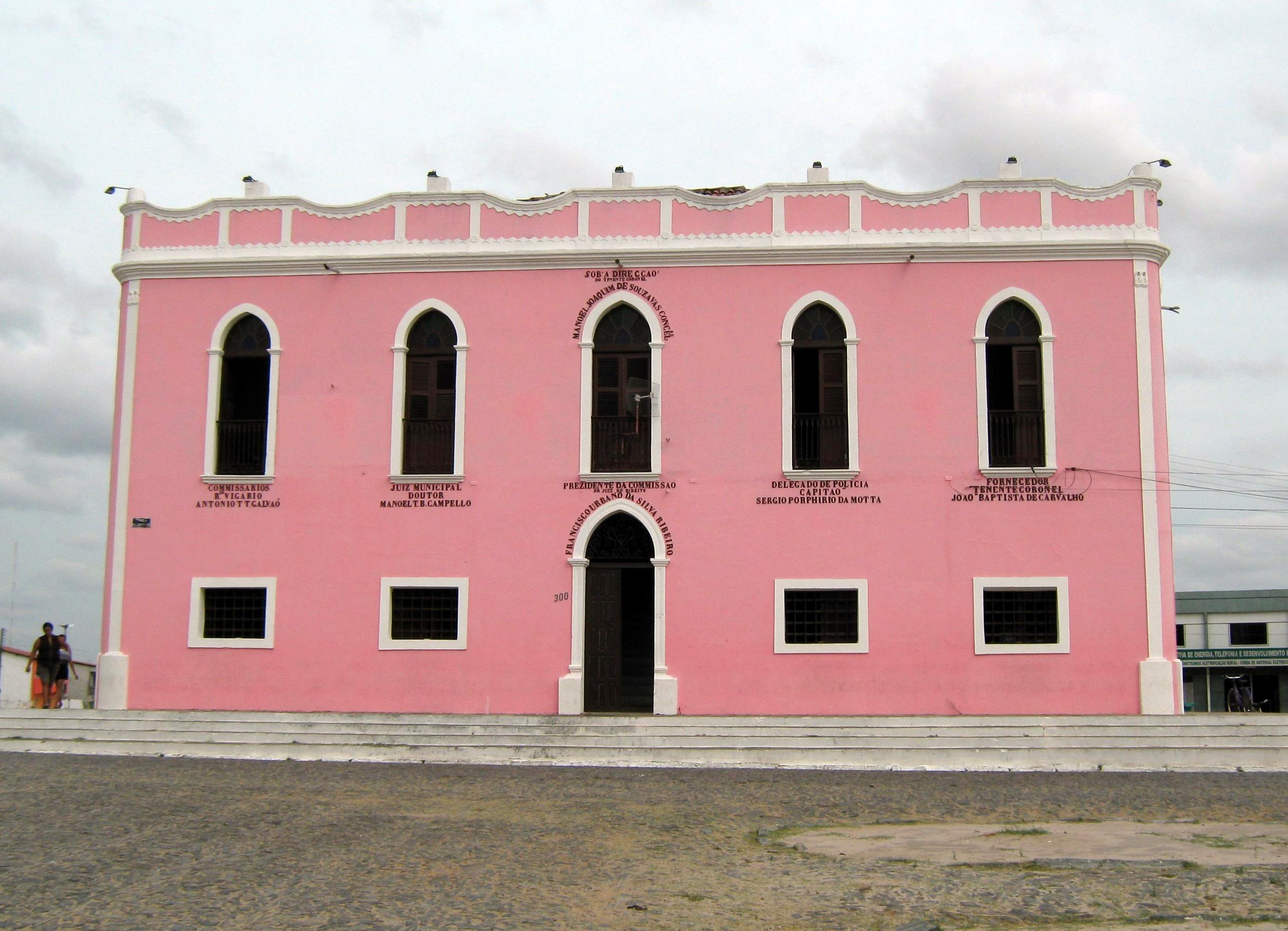 Casa de Camara e Cadeia de Granja construida em 1877